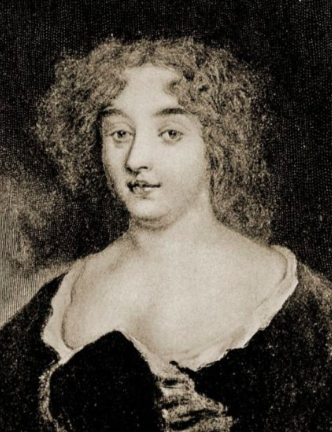 Caroline du Colombier, future baronne de Garempel de Bressieux, premier amour de Napoléon Bonaparte